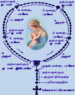 செபமாலை விளக்கம்